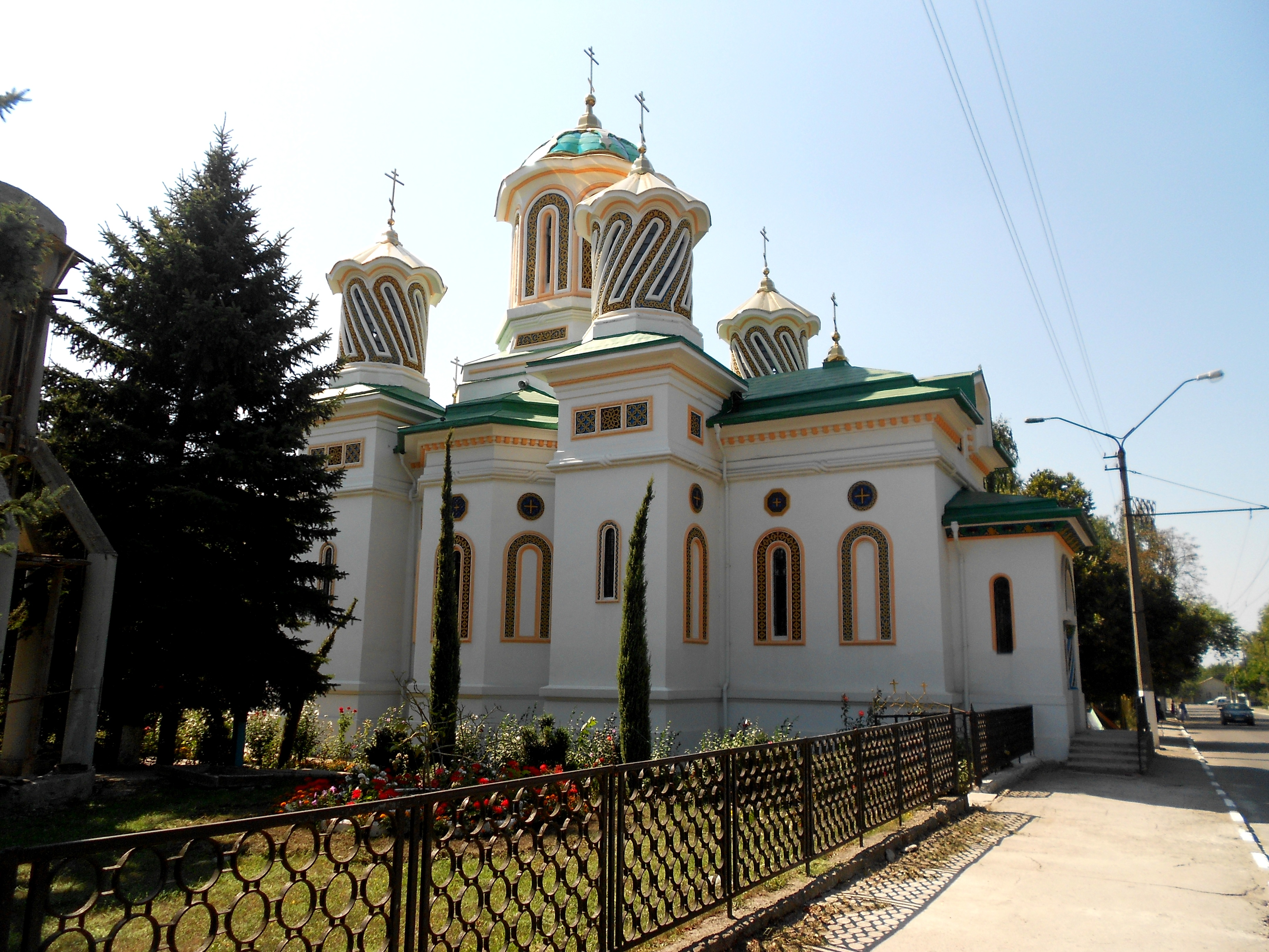 Biserica Sfânta Parascheva din Bălți